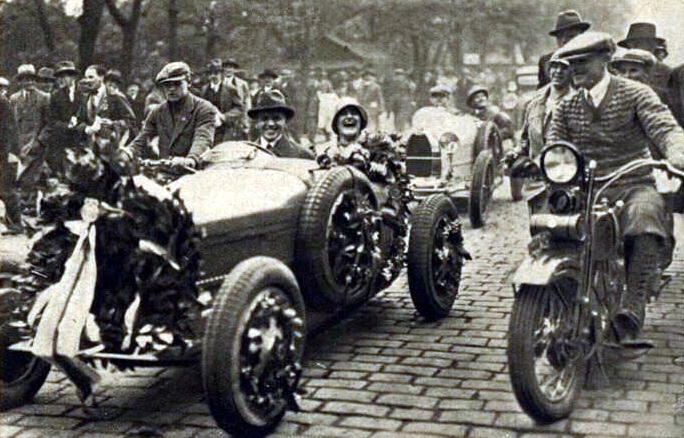 E. Junková po návratu z Targa Florio, Praha, 1928